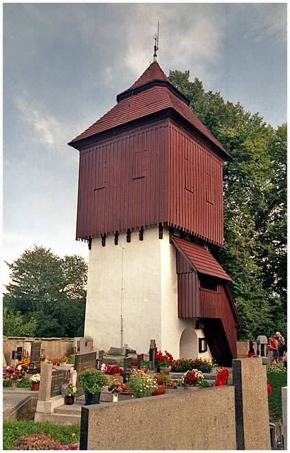 Zvonice při kostele Svatého Jana Křtitele ve Slavoňově, okres Náchod autor: Prazak